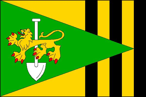 Vlajka obce Rozsíčka